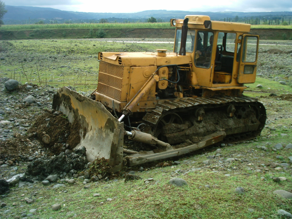 Sachkhere (Georgia) September 2003 (auf Deutsch; in German) en español